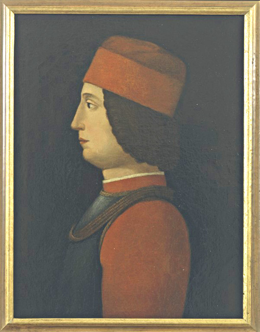 fine XV secolo